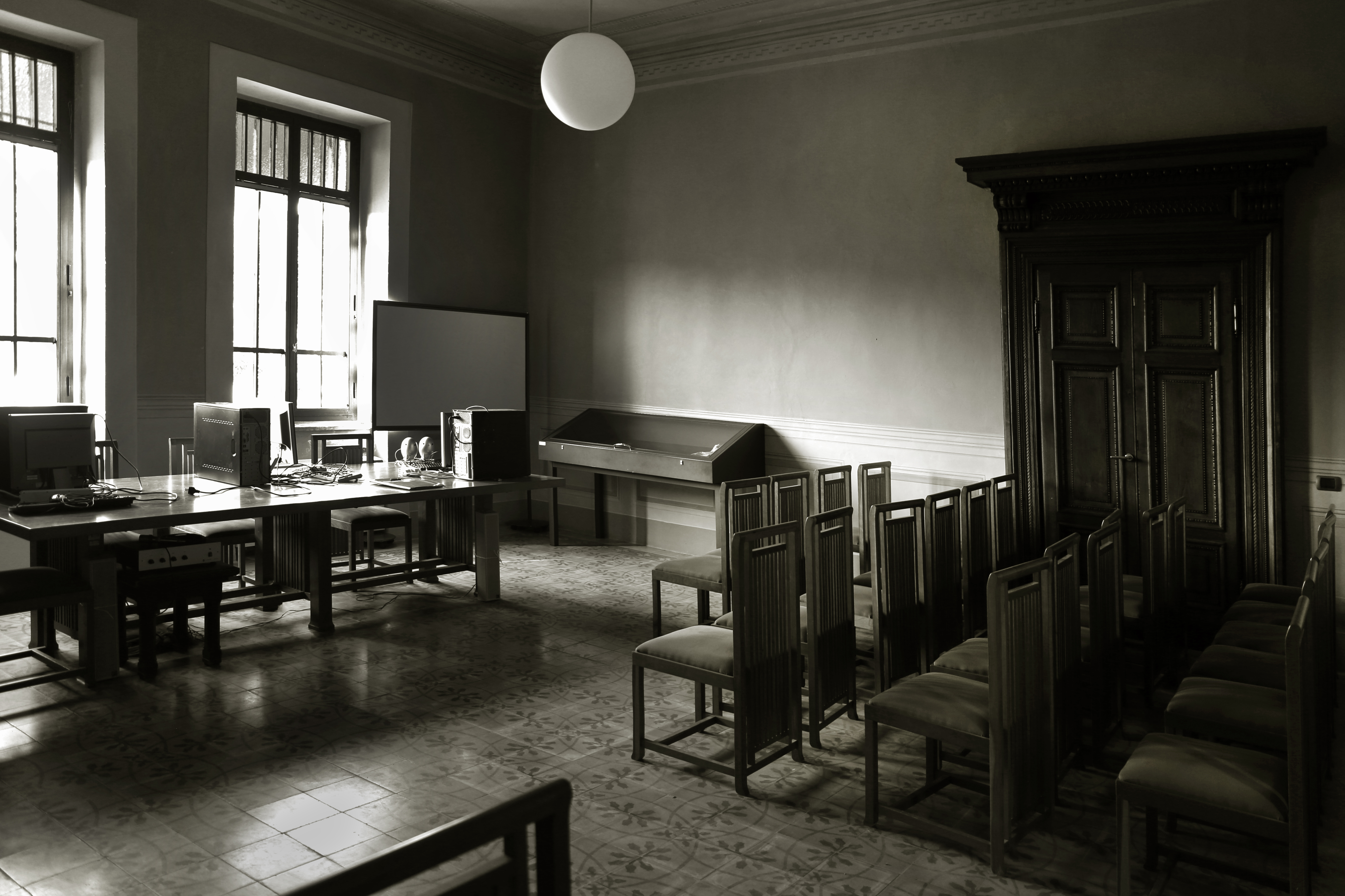 Sezione di Archivio di Stato di Pescia This is a photo of a monument which is part of cultural heritage of Italy.